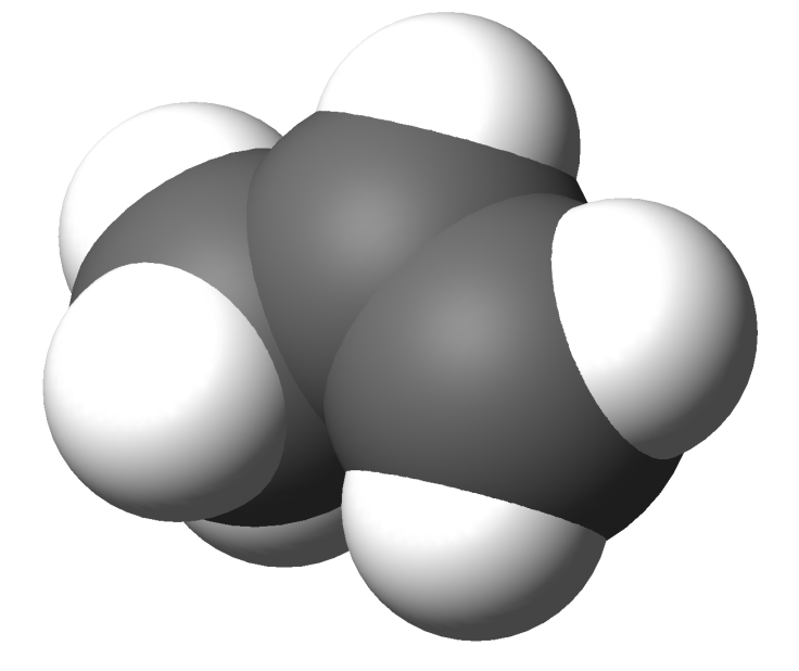 Propylene